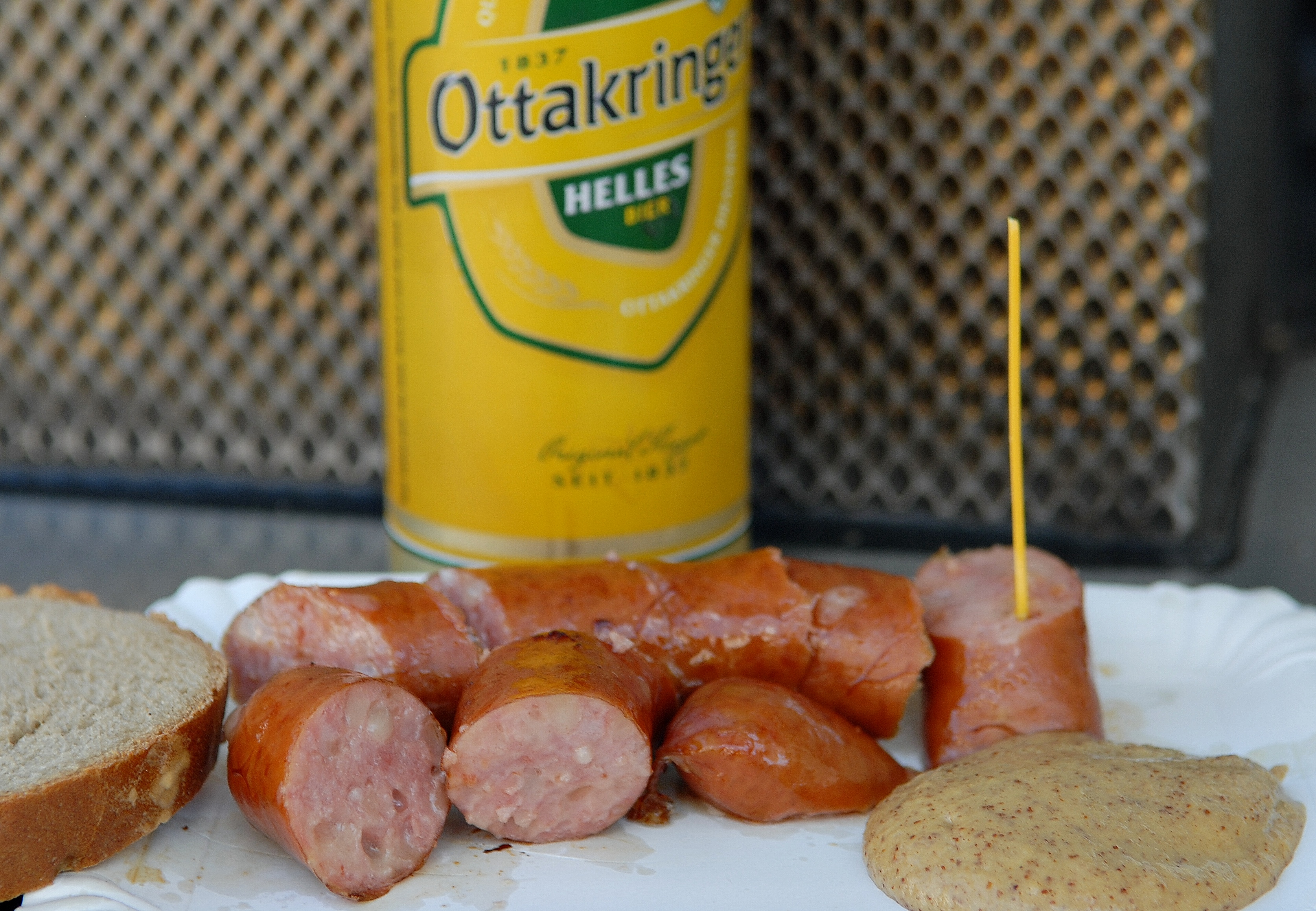 Käsekrainer mit Ottakringer Bier aus der Dose (wienerisch: „Eitrige mit an 16er Blech“), 2012